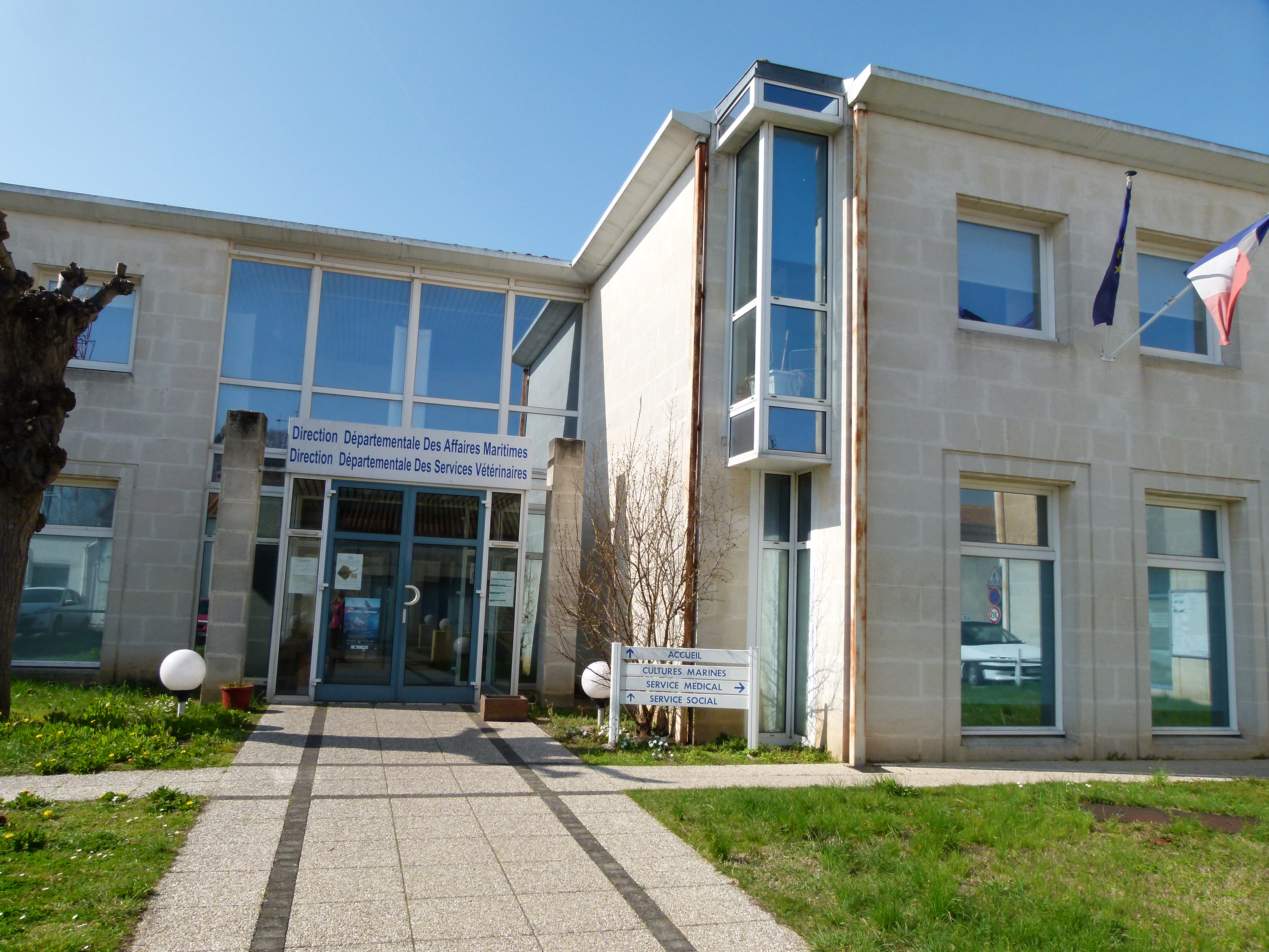 L'antenne de la Direction Départementale des Affaires Maritimes à Marennes (17)